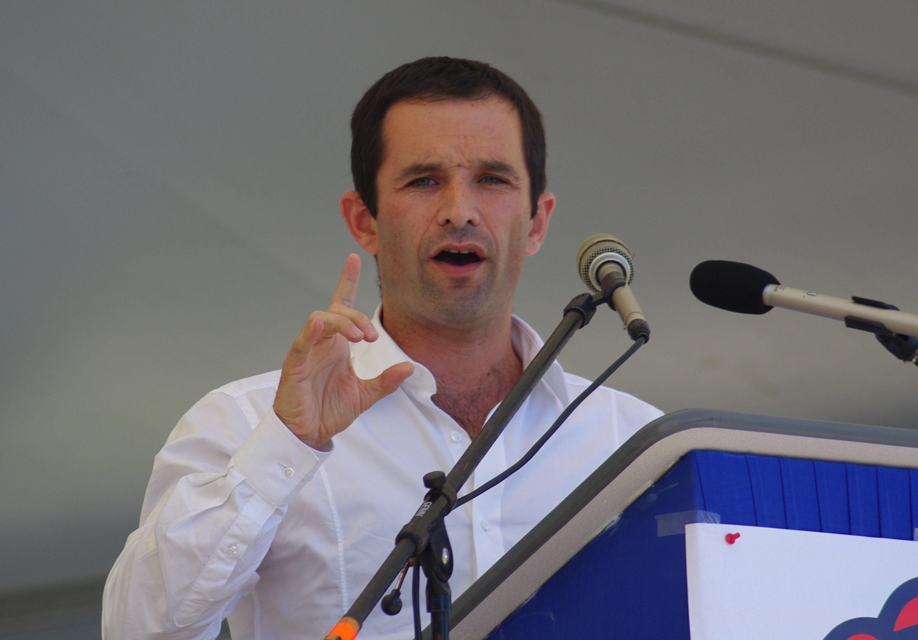 Benoît Hamon à La Fête de la Rose du PS 44, à Préfailles le 15 septembre 2009